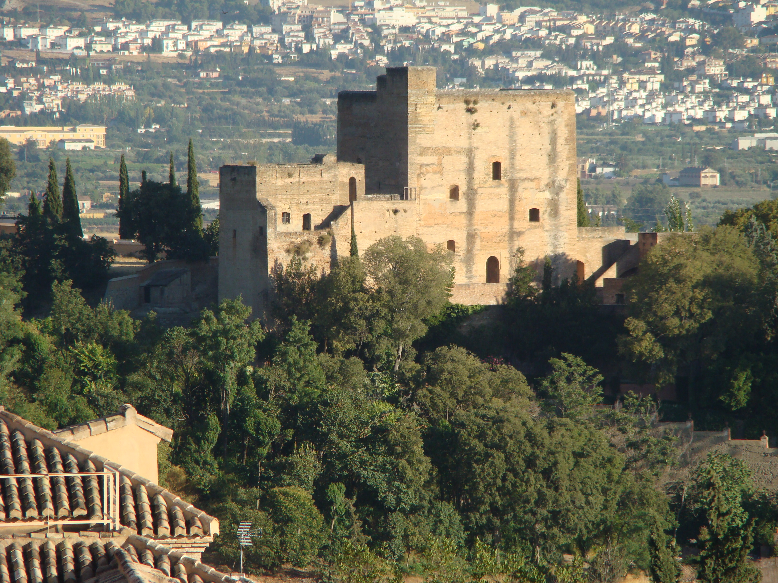 Castillo del Mauror, también llamado Torres Bermejas, en Granada